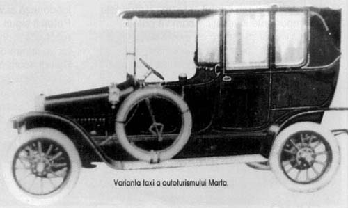 A MARTA gépkocsi TAXI változata